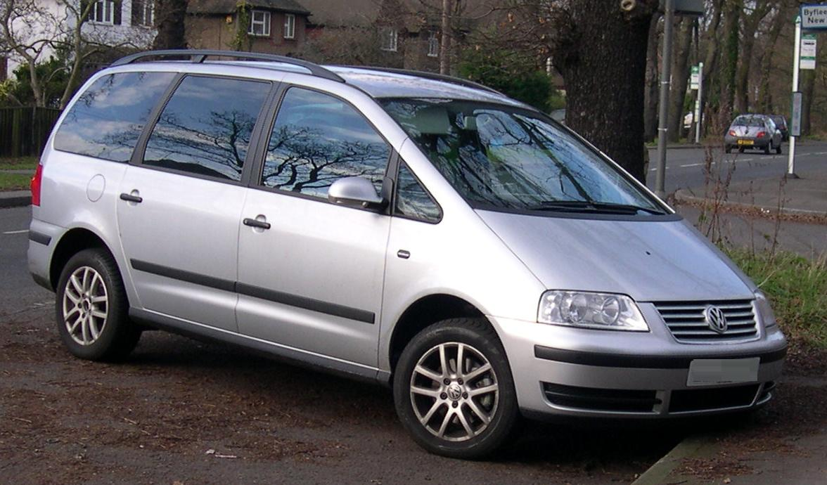 VW Sharan Photo by User:Sfoskett